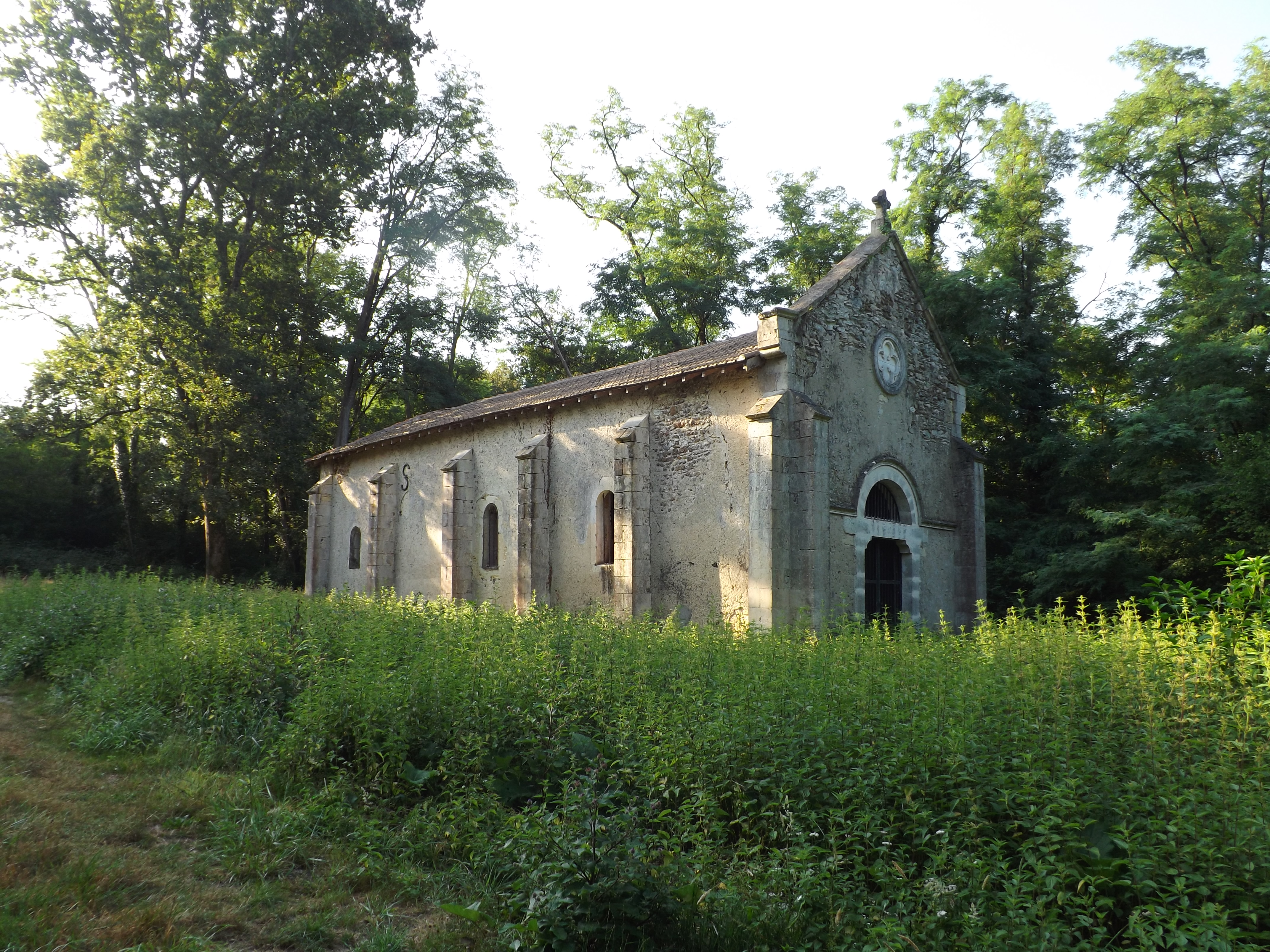 Capèra de Nosta Dauna d'Agès, Montsegur, Shalòssa, Gasconha